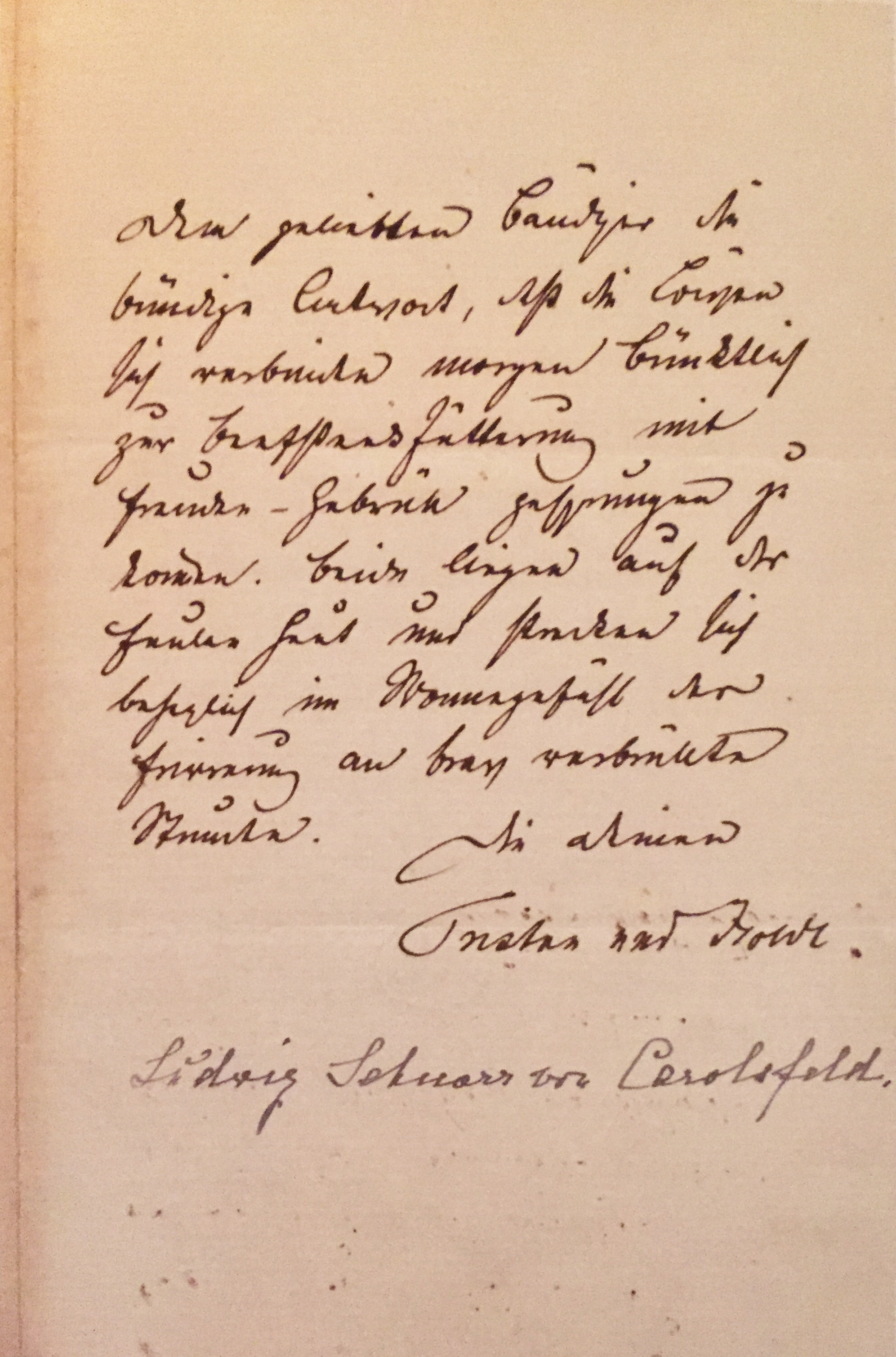 Ludwig Schnorr von Carolsfeld an Richard Wagner nach Tristan-Uraufführung